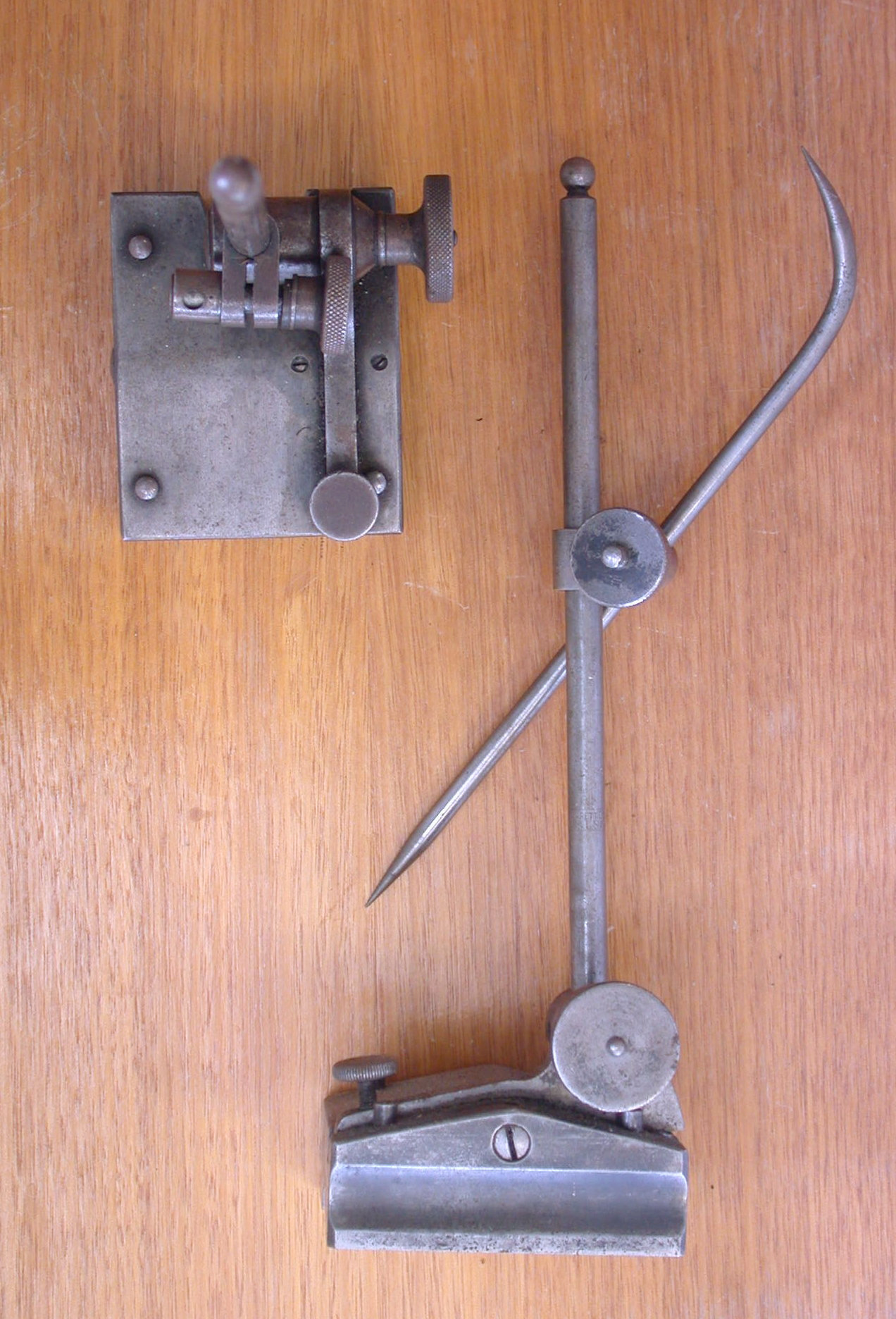 surface gauge